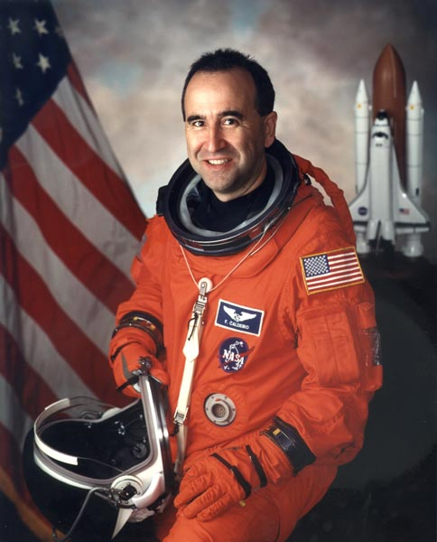 portrait astronaut Fernando Caldeiro